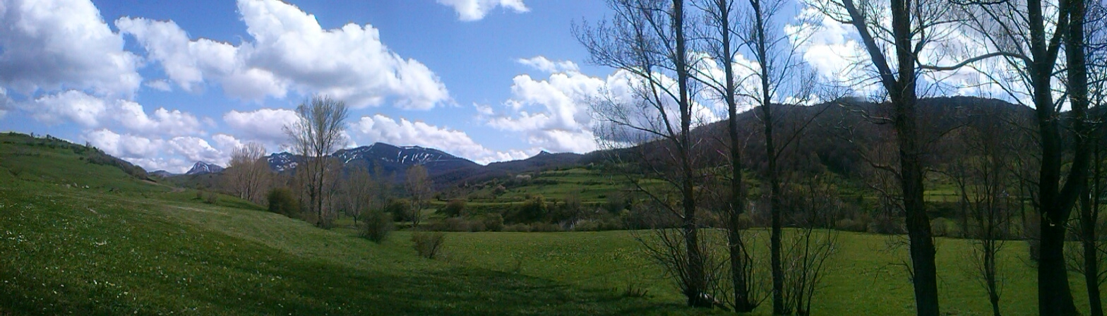 Panorámica desde la Vega de la Iglesia. La Uña